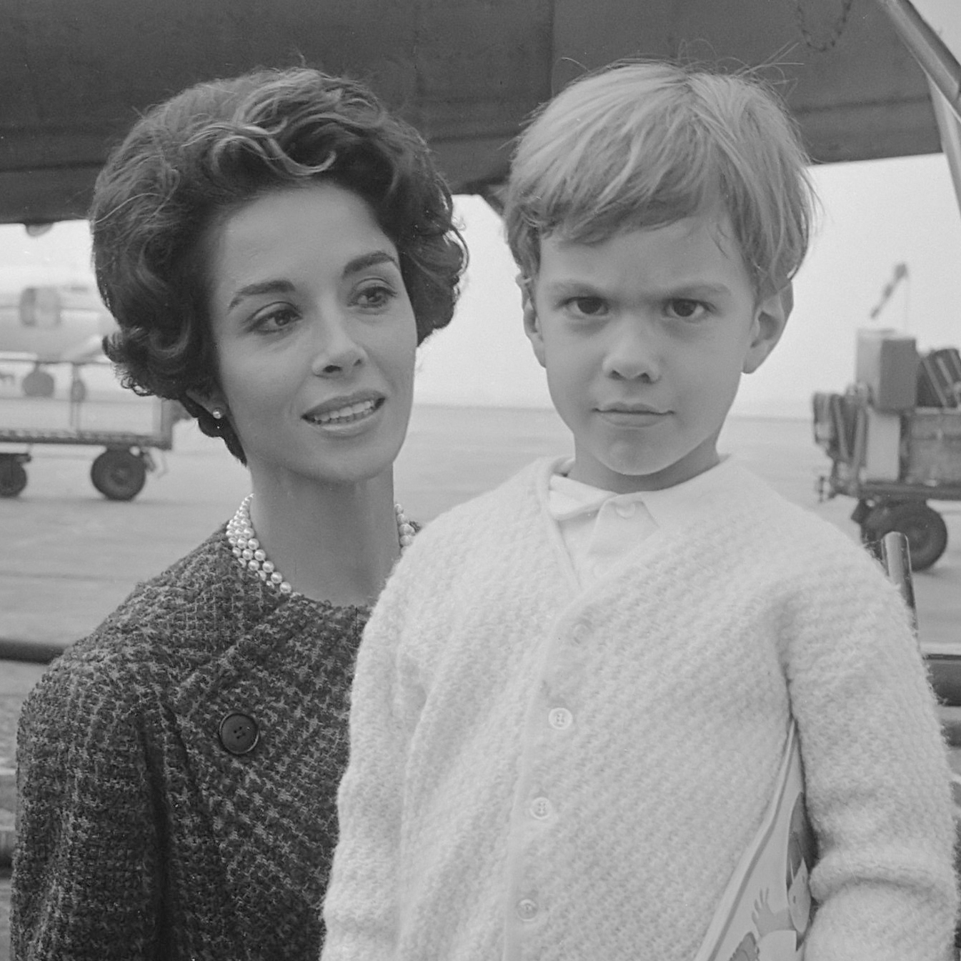 Filmster Dana Wynter met zoon Mark op Schiphol 23 september 1963